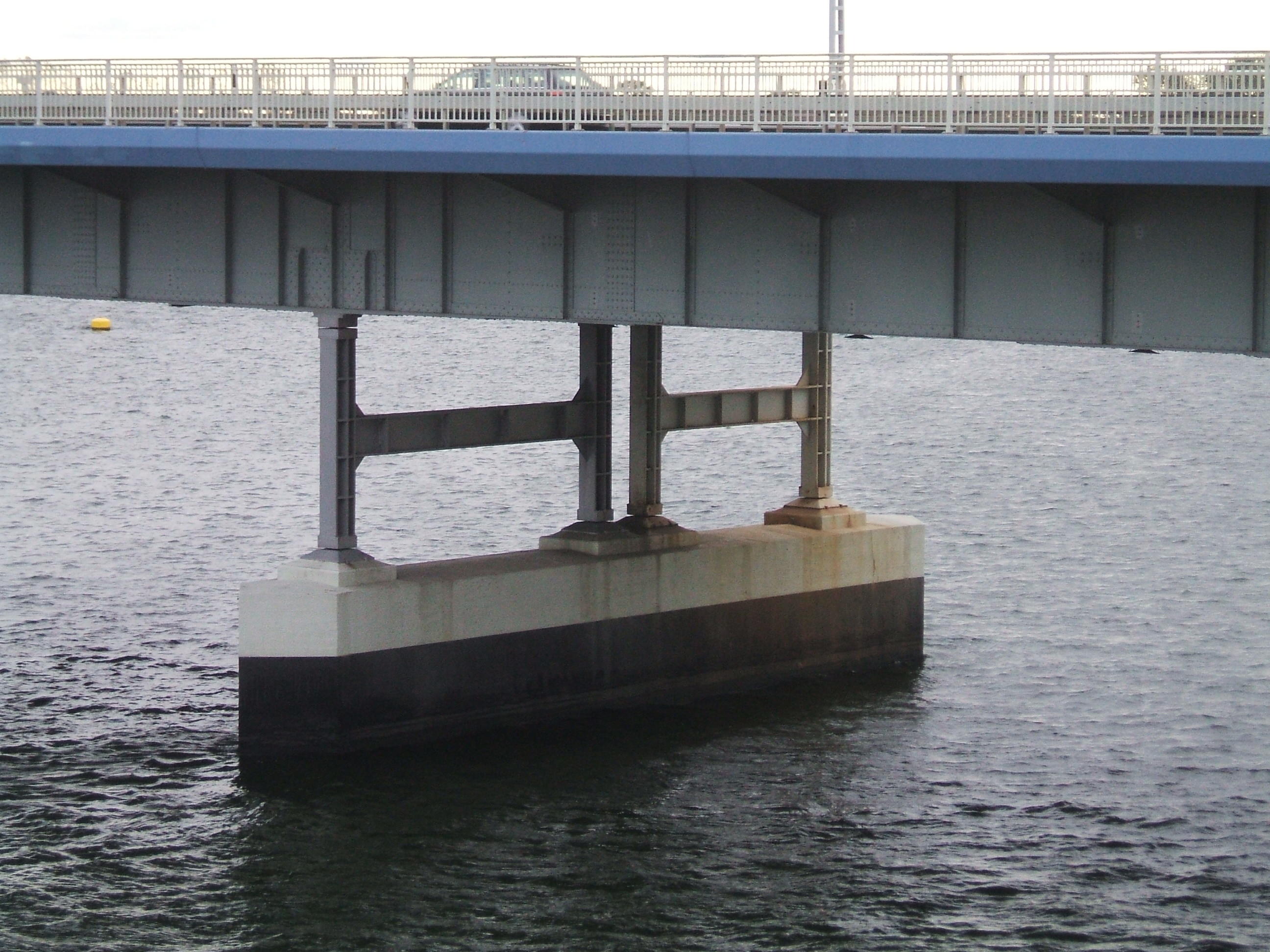 Strelasundbrücke, Pendelstützen